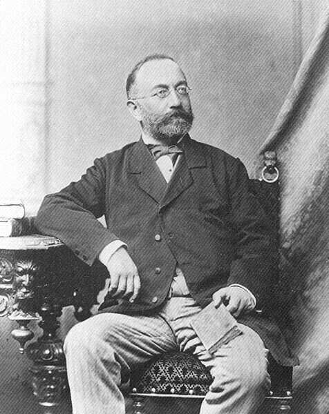 József Budenz - Fotógráfia, 1880 után